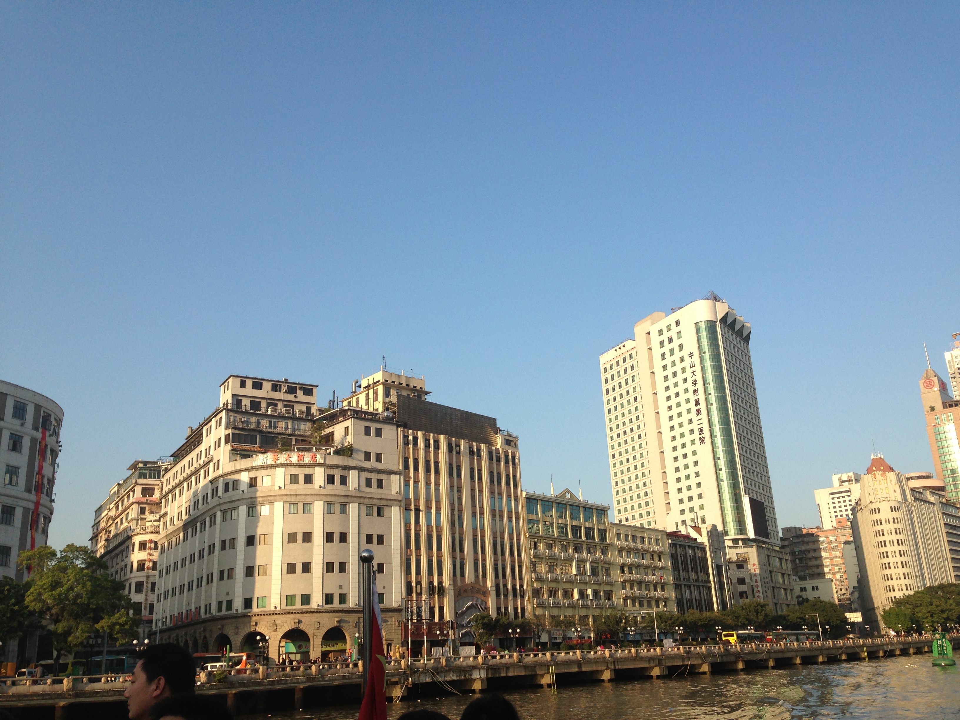 廣州市珠江，可見大同酒家、廣州電影院、中山大學孫逸仙紀念醫院、愛羣大酒店。